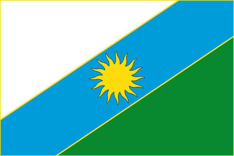 Flag of La Vega, Andalusian shire